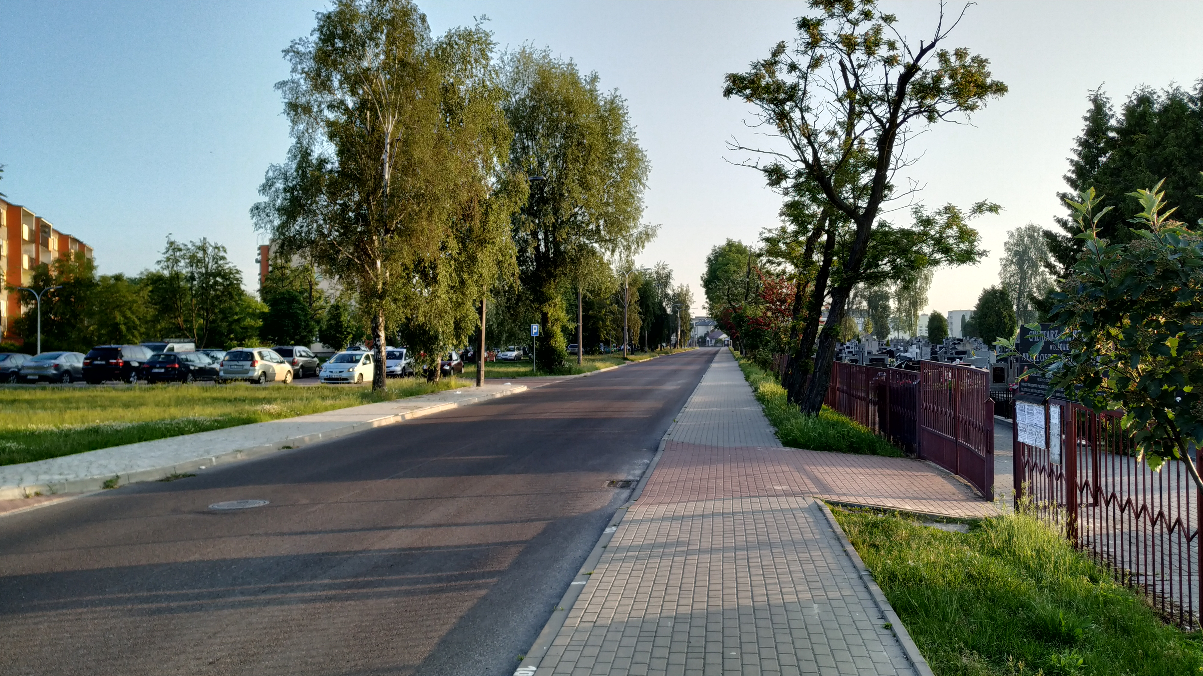 Ulica 700-lecia w Łukowie, z prawej wejście na cmentarz św. Rocha